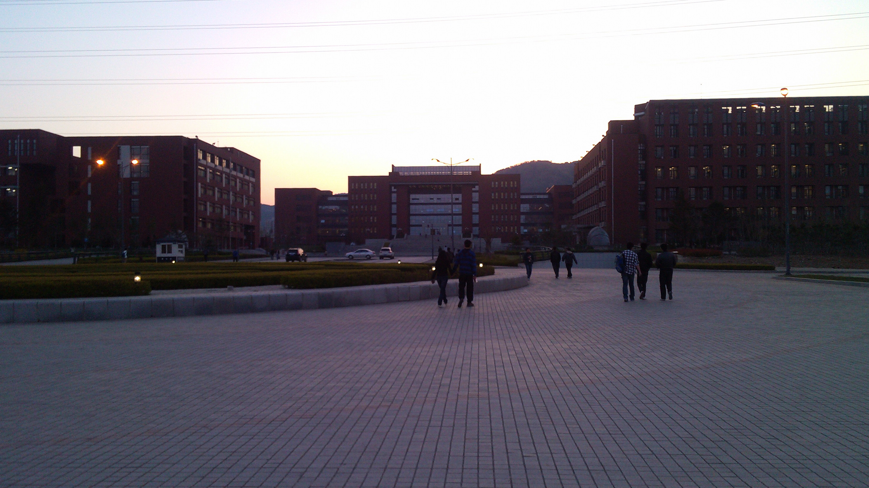 从东向西拍摄的大连理工大学西部校区